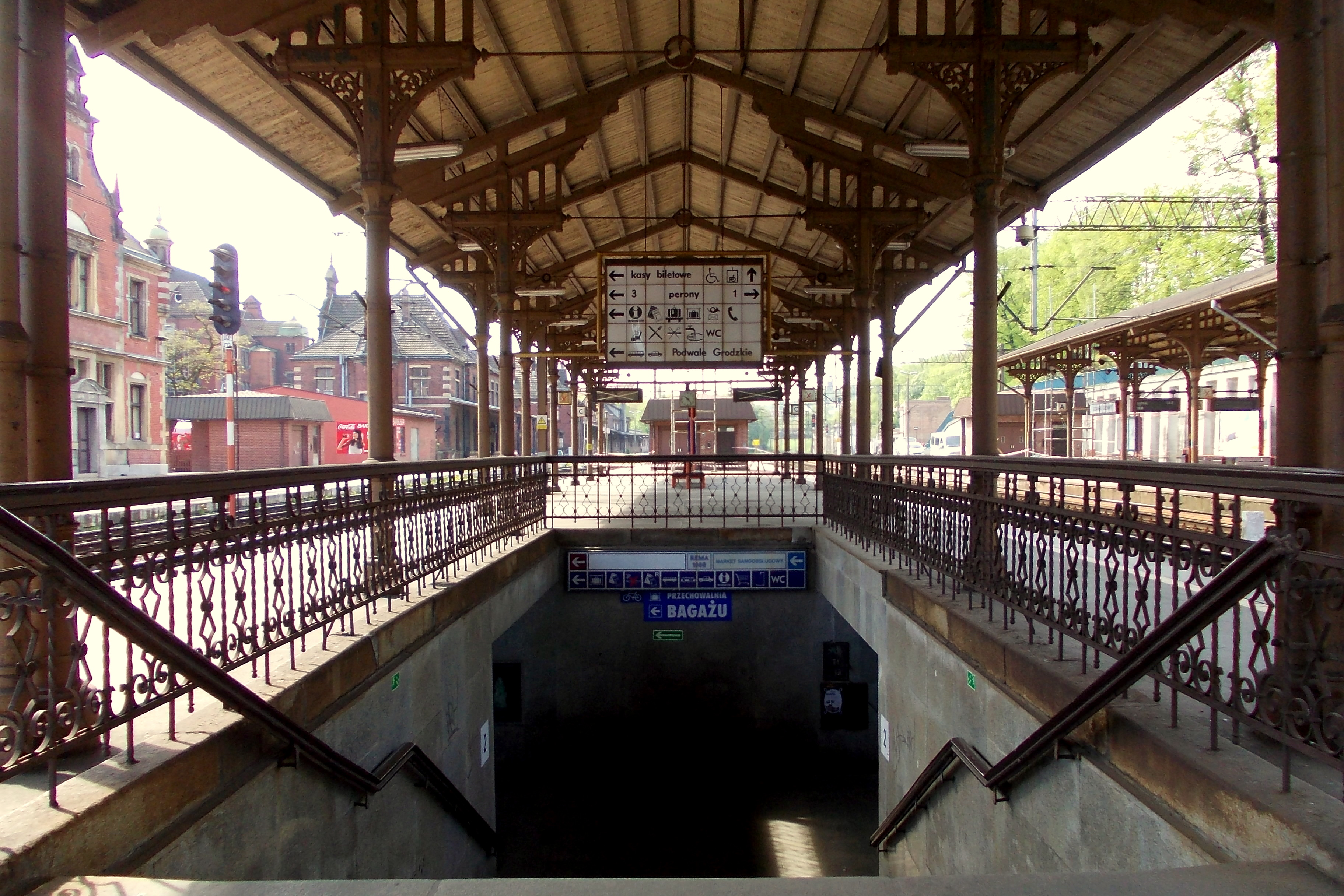 peron 2 w Gdańsku Głównym